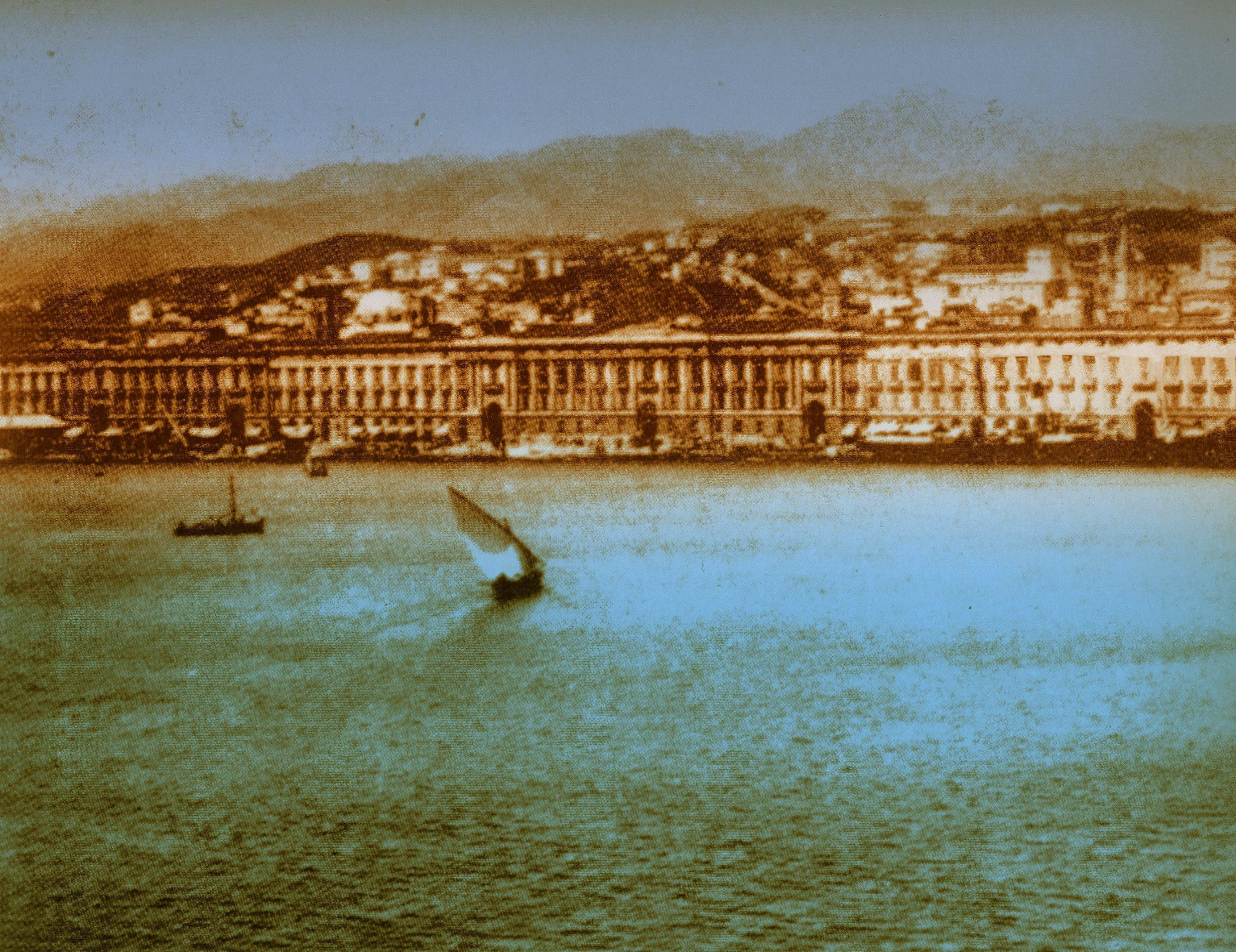 Palazzata